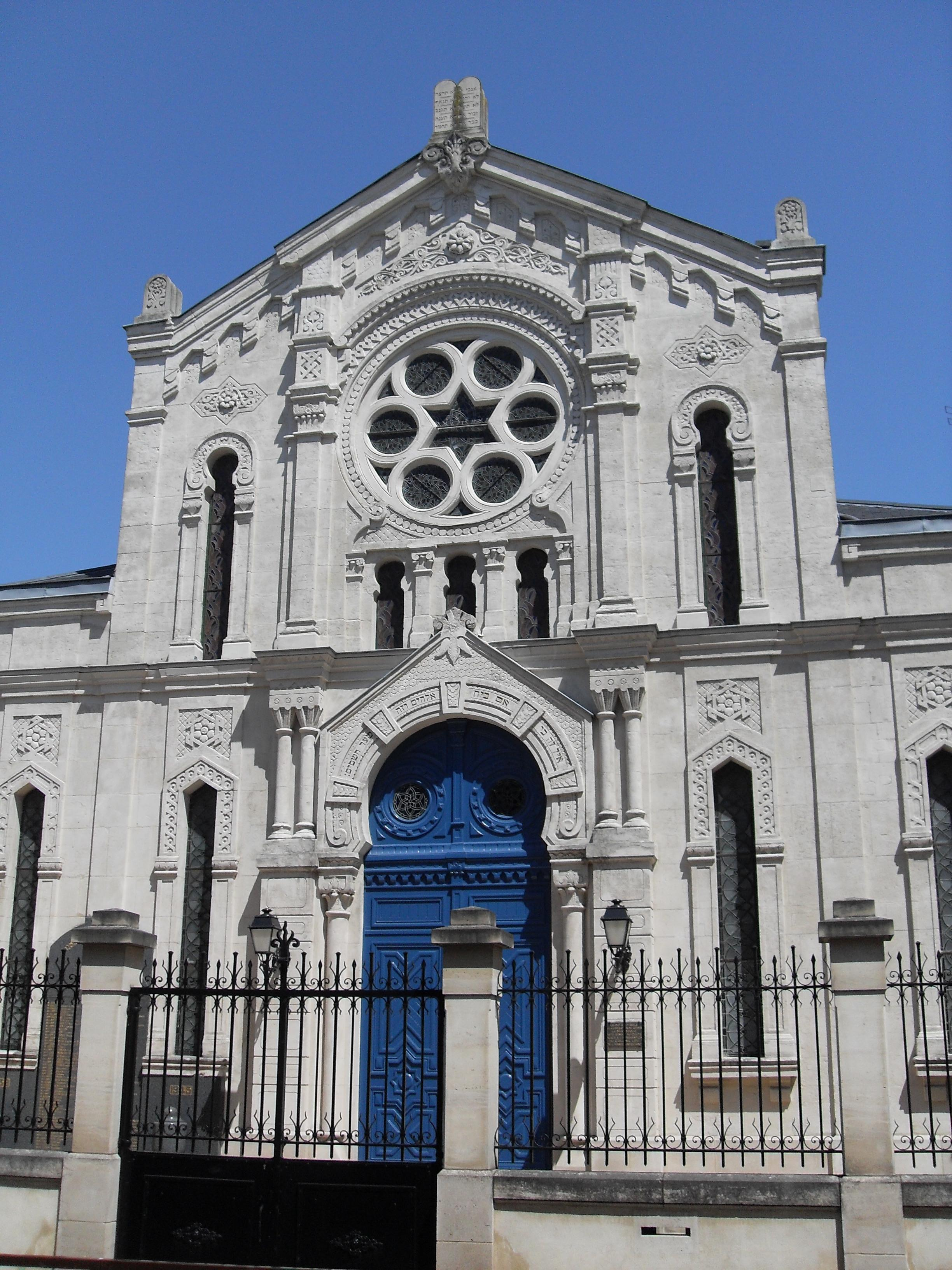 France, Reims, Marne (51) - Vue générale de la Synagogue de Reims.